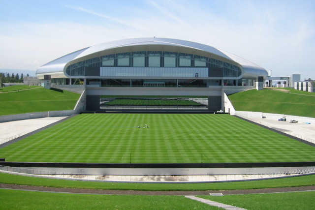 撮影場所:札幌ドーム 撮影日:2002年8月26日 撮影者:モンモン 2007年5月23日 (水) 18:54 . . もんもん . . 640×480 (84 キロバイト)